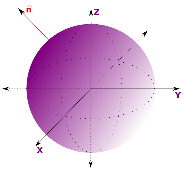 Gráfico para ejemplificar el Teorema de la Divergencia de Gauss